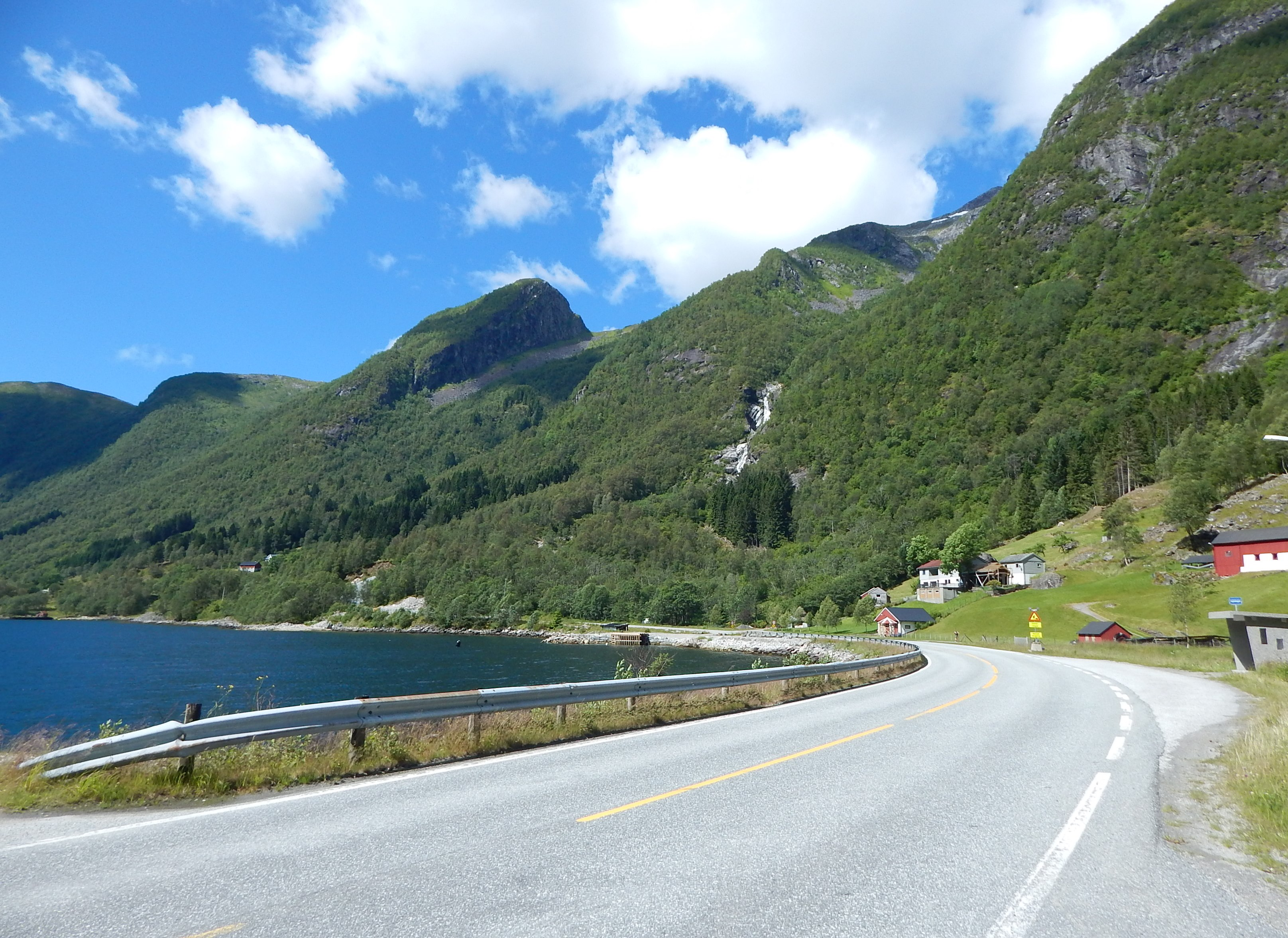 FV55 ved Lånefjorden